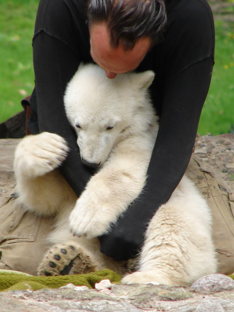 Eisbär Knut am 31. Mai 2007 im Zoologischen Garten Berlin